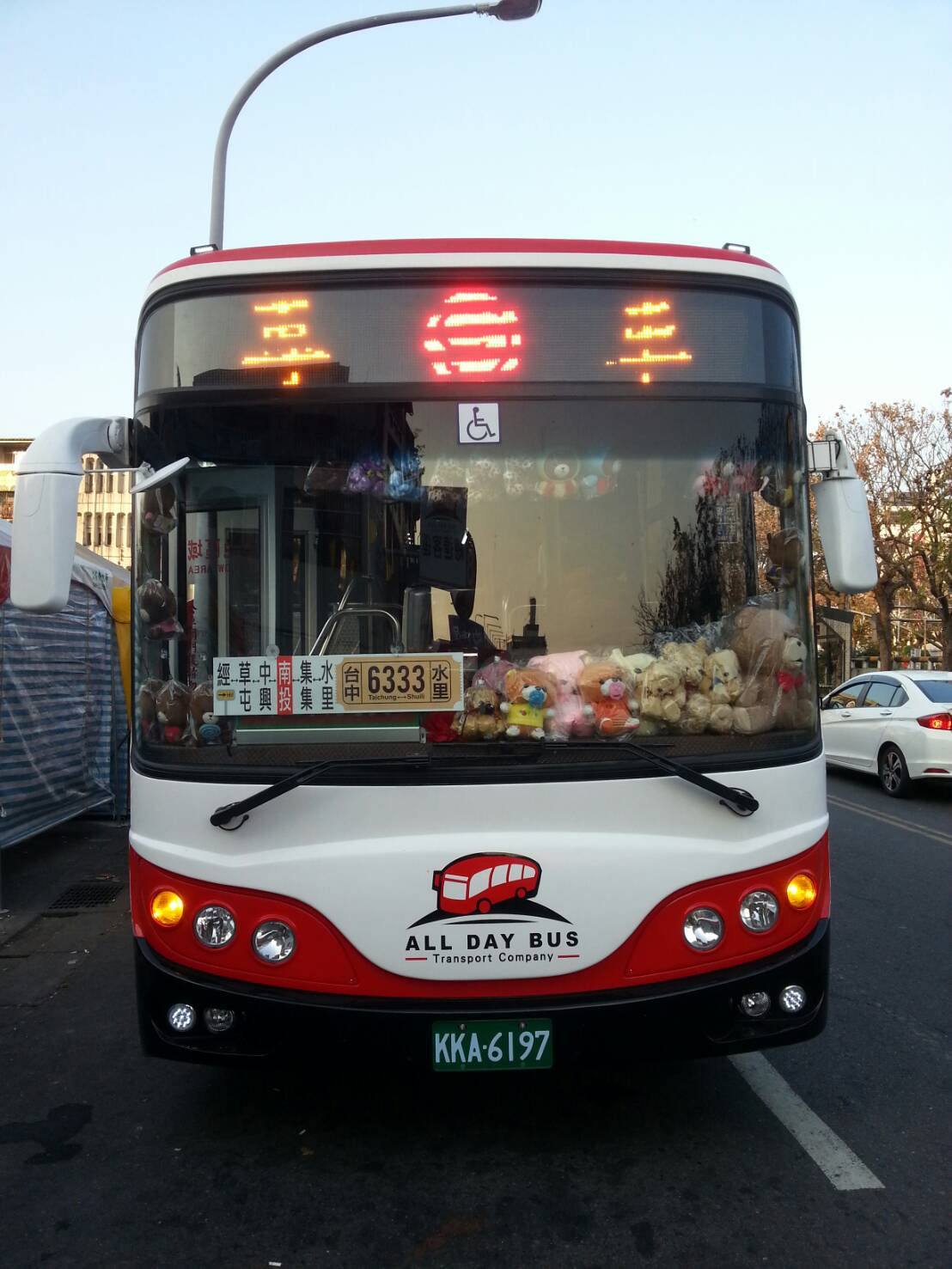 總達客運大客車KKA-6197車頭